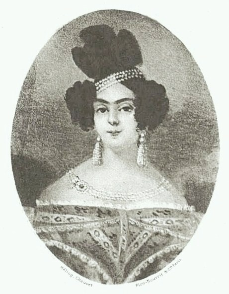 Гартинг Елена Григорьевна (1786—1831), ур. Стурдза, в первом браке Гика.